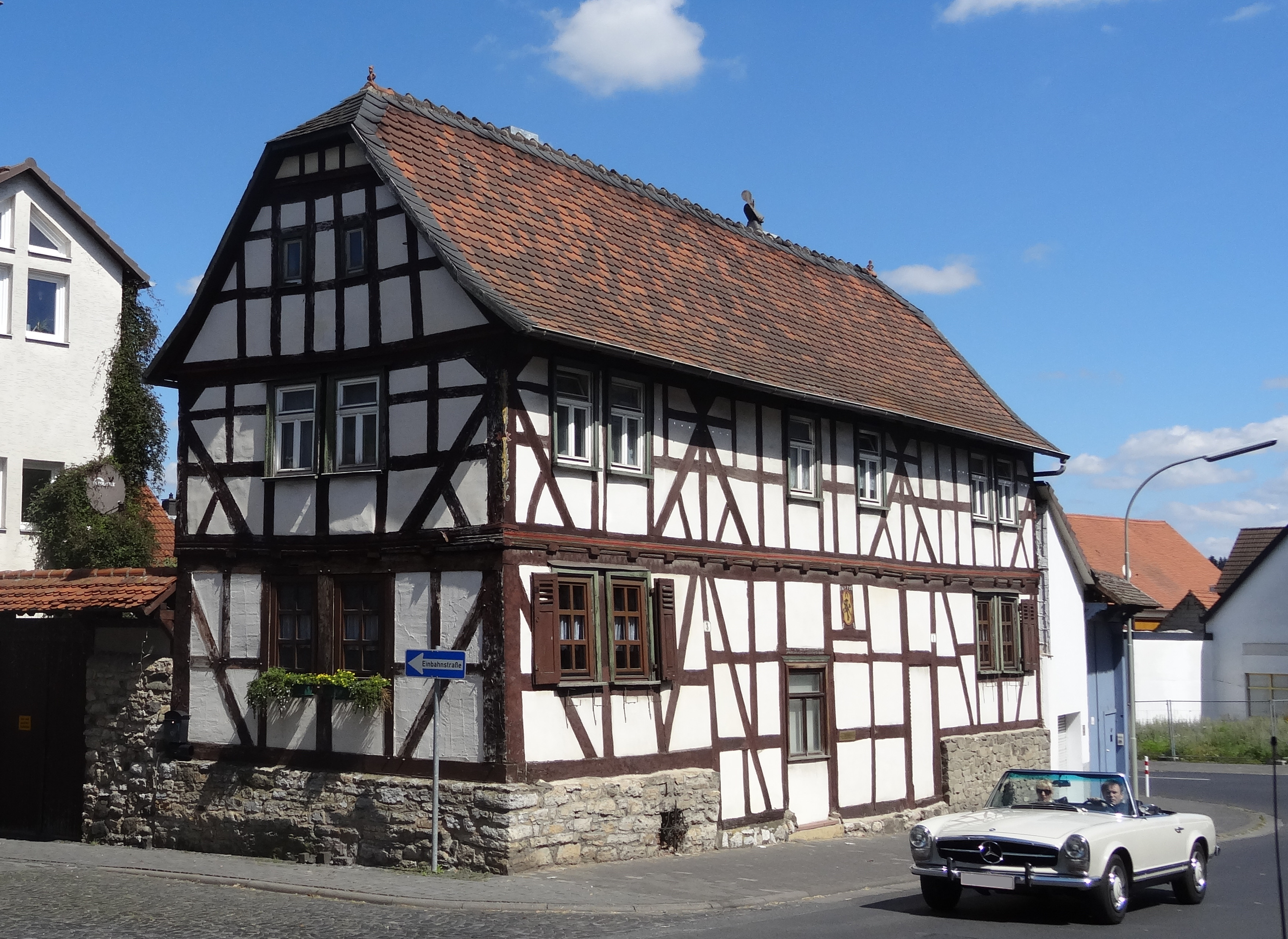 Haus Paradiesgärtlein, Mercedes